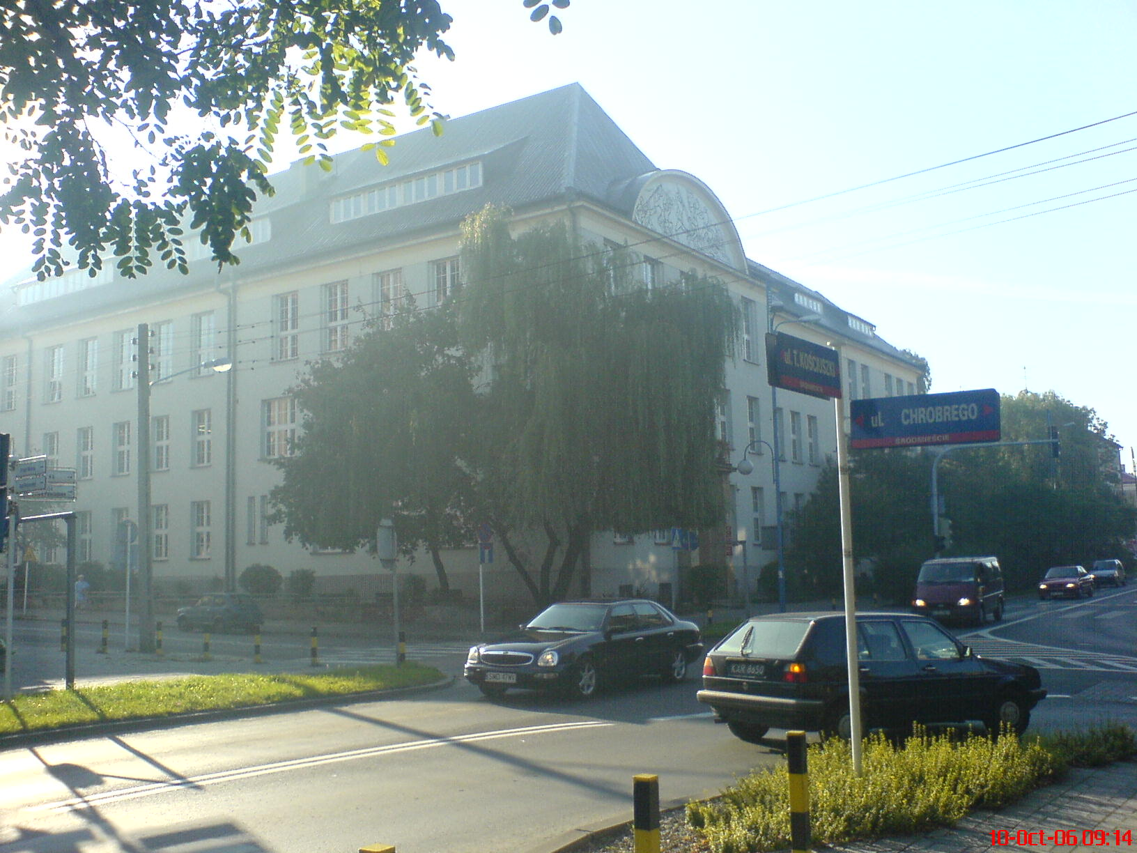 ILO, Rybnik